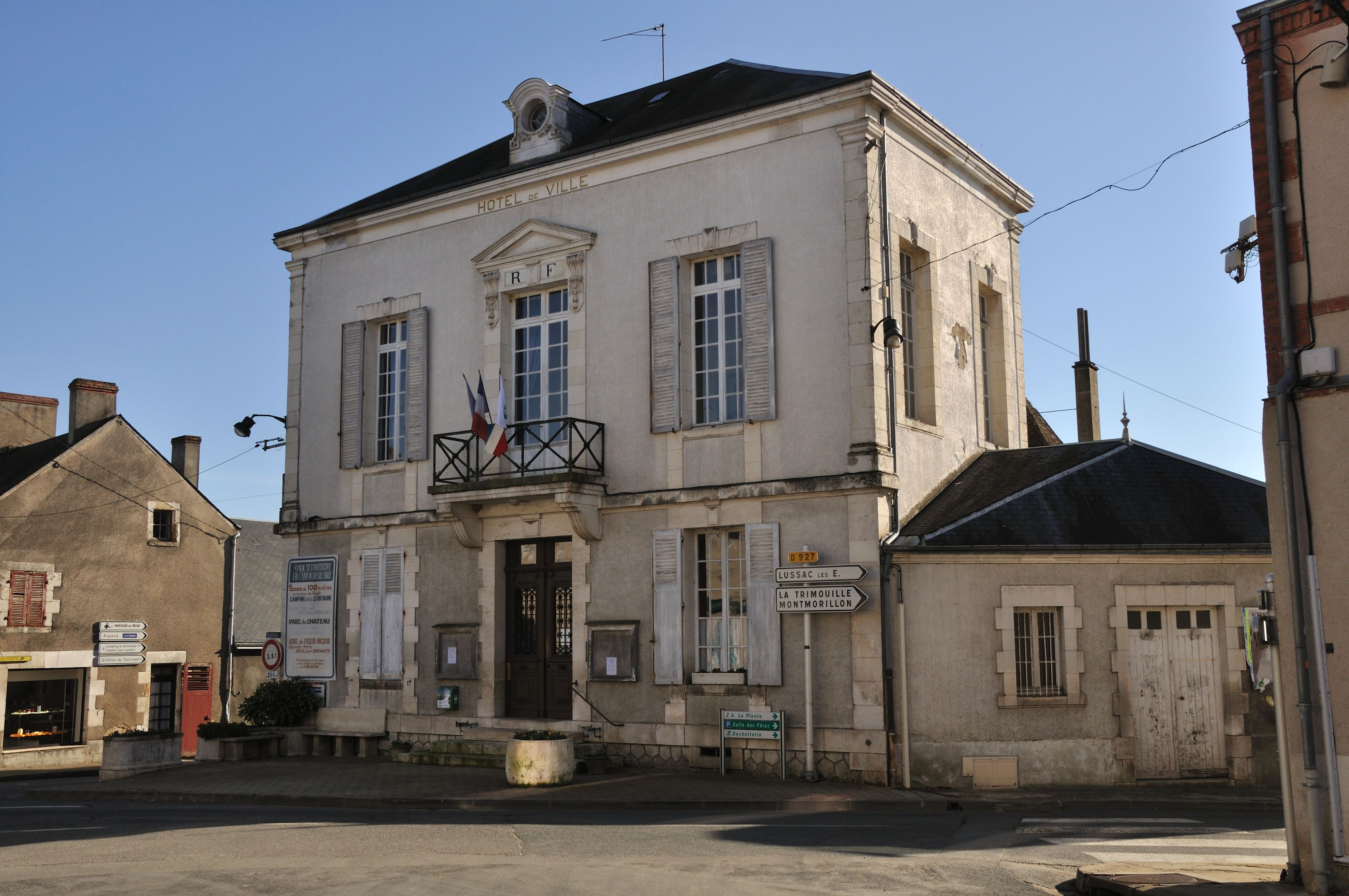 Bélâbre (Indre) - Mairie